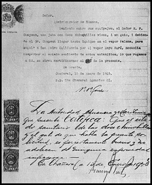 Erlaubnis zum Export der Chapman-Chinchillas aus Chile nach den USA, 15.1.1923